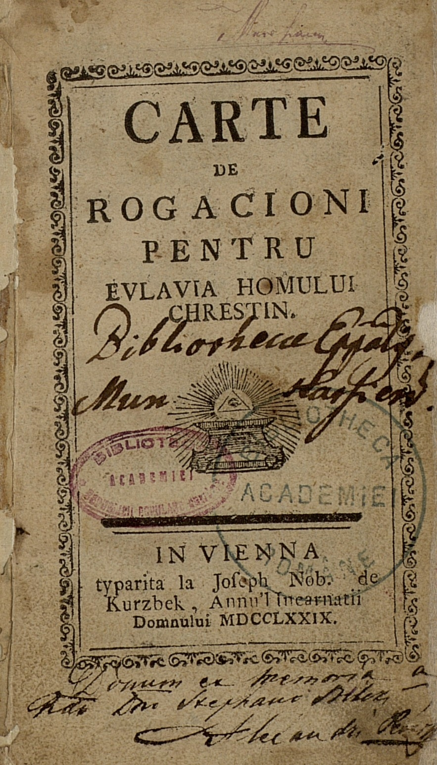 Pagină de titlu a lucrării „Carte de rogacioni pentru evlavia homului chreştin”, Viena, 1779, de Samuil Micu-Klein.